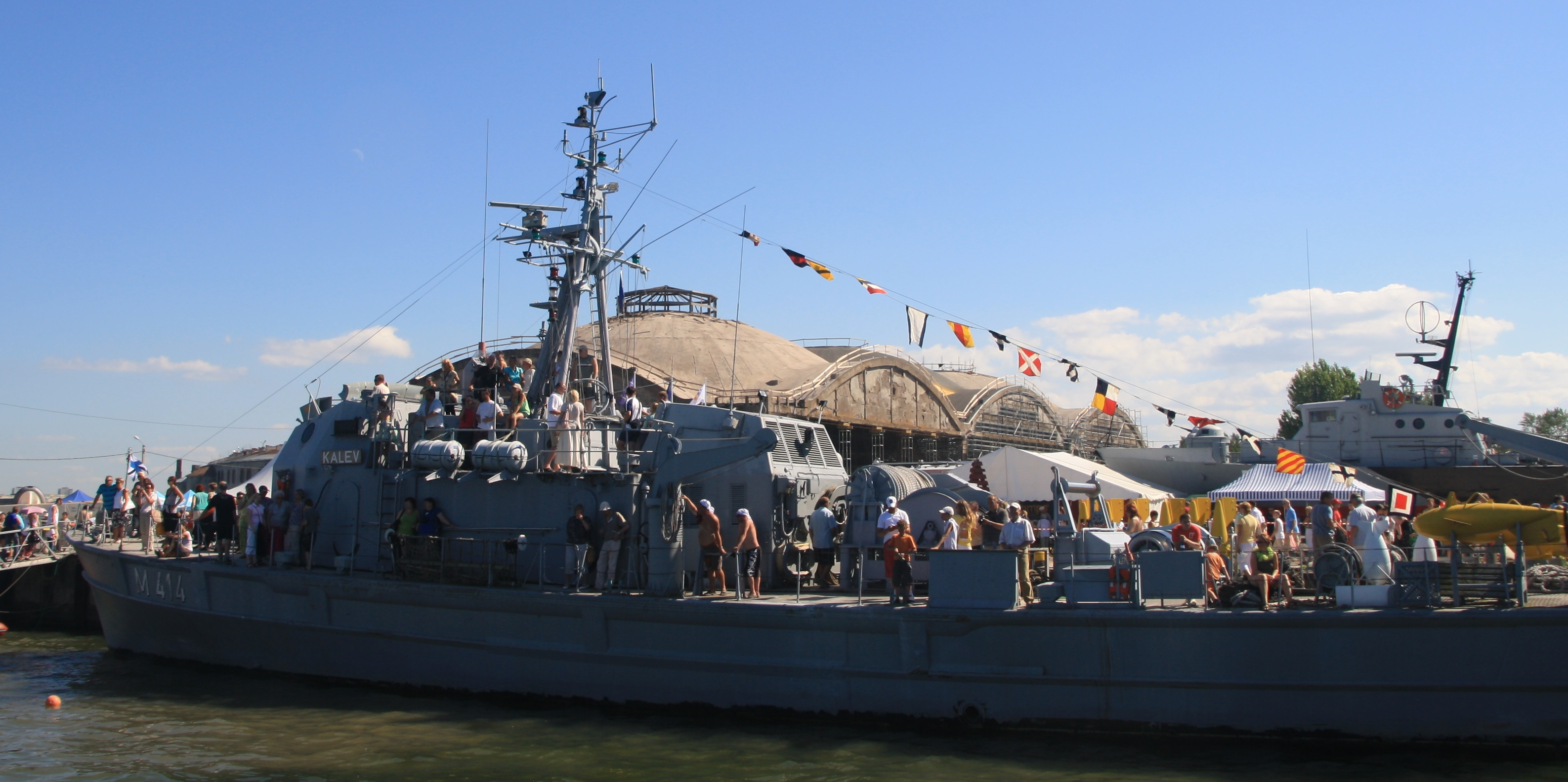 Miinilaev Kalev Tallinna merepäevadel